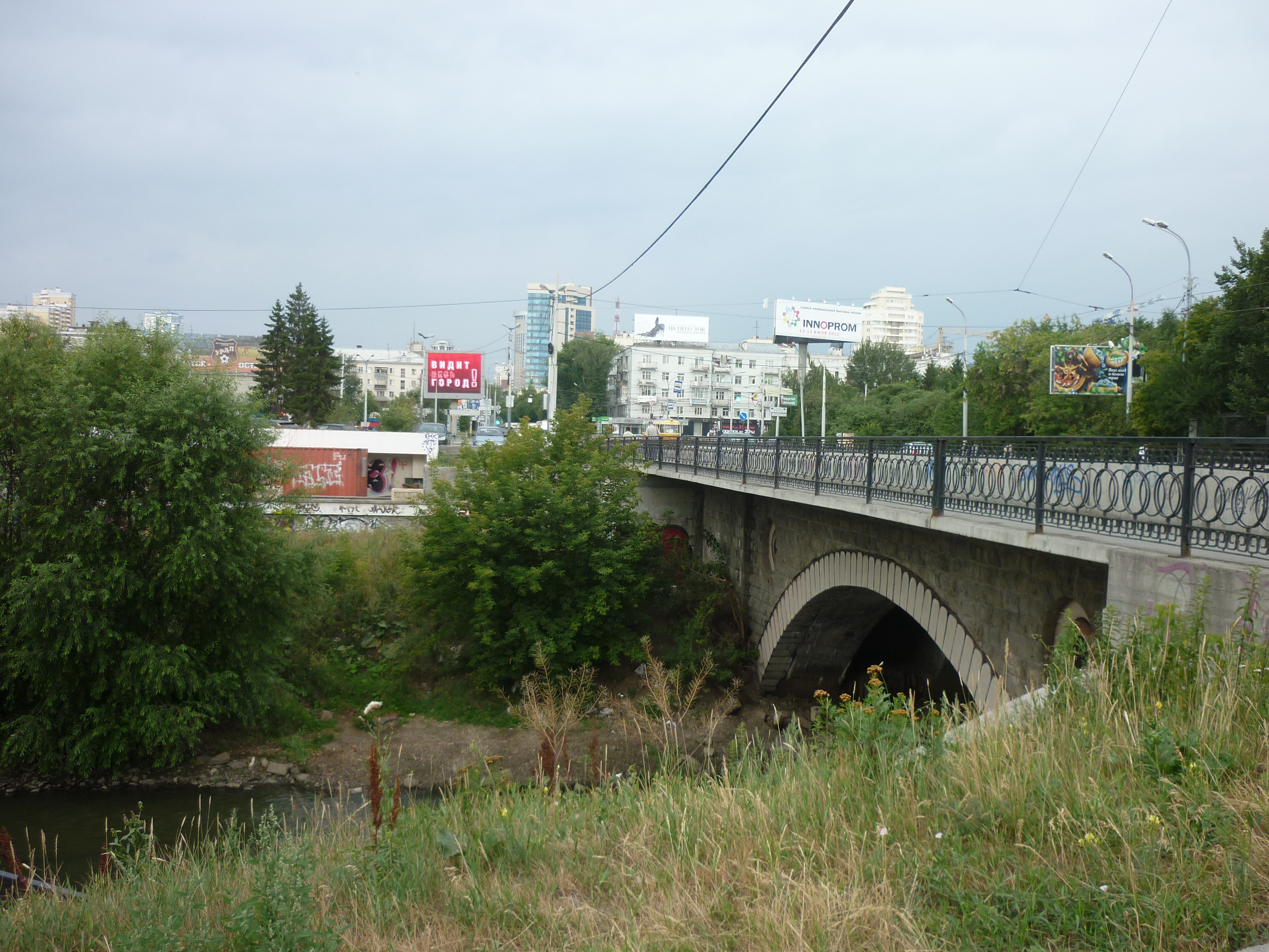 Мост на ул. Куйбышева у Цирка 56.8272718, 60.6057441